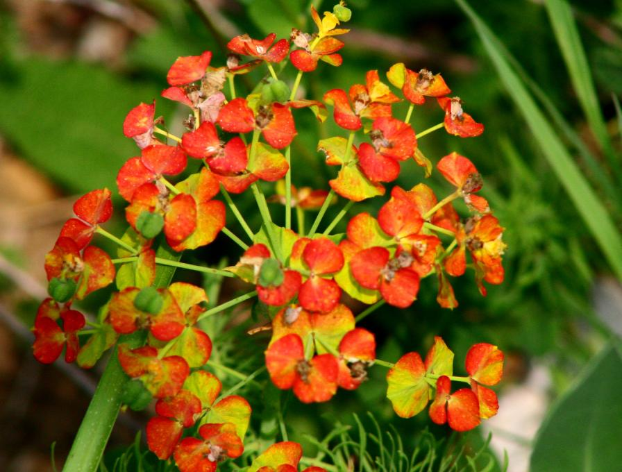 Euphorbia_cyparissias - Località : Zelant, Mel (BL), 761 m s.l.m.